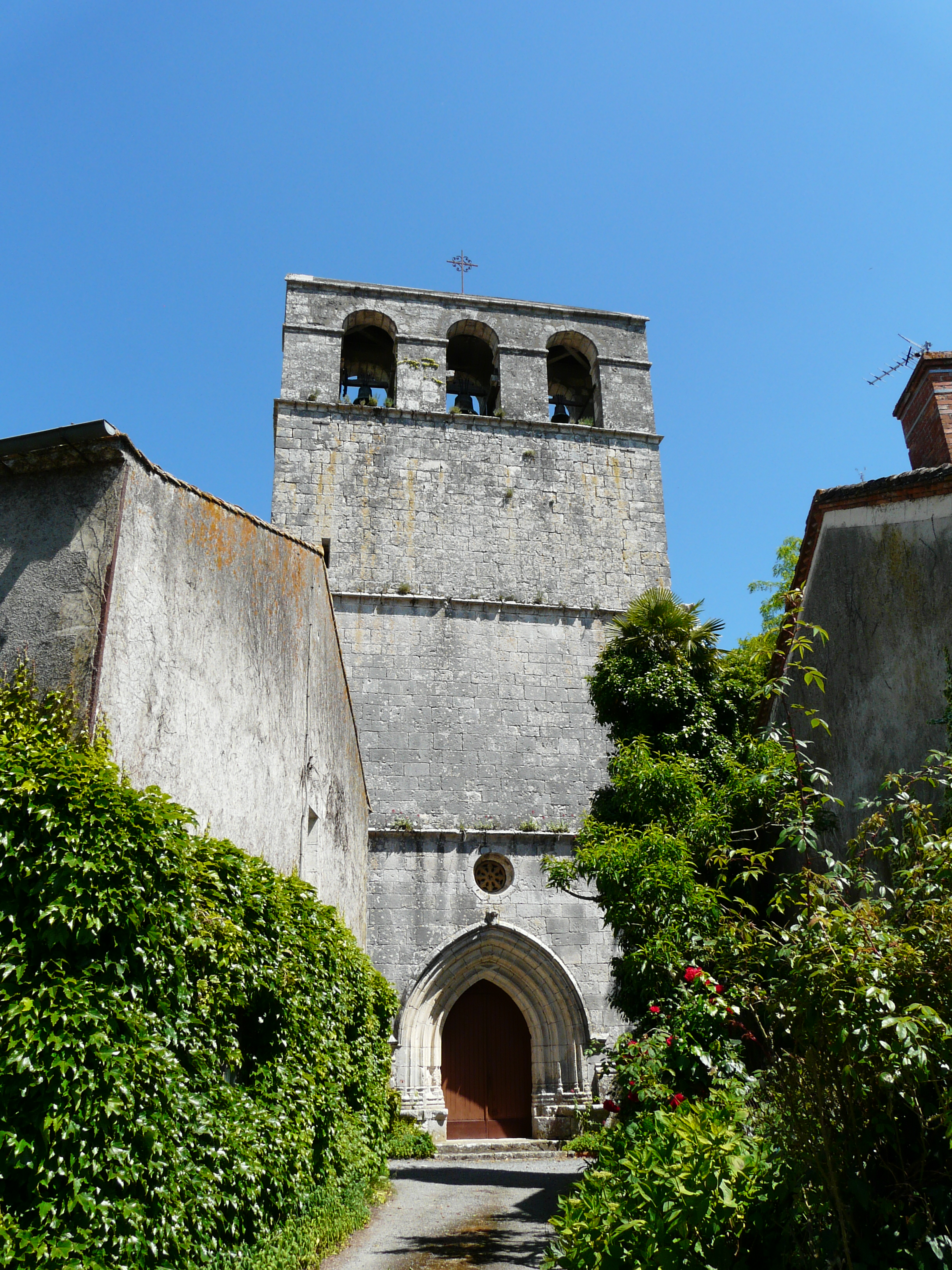 L'église Saint-Laurent-et-Saint-Martin, Conne-de-Labarde, Dordogne, France.